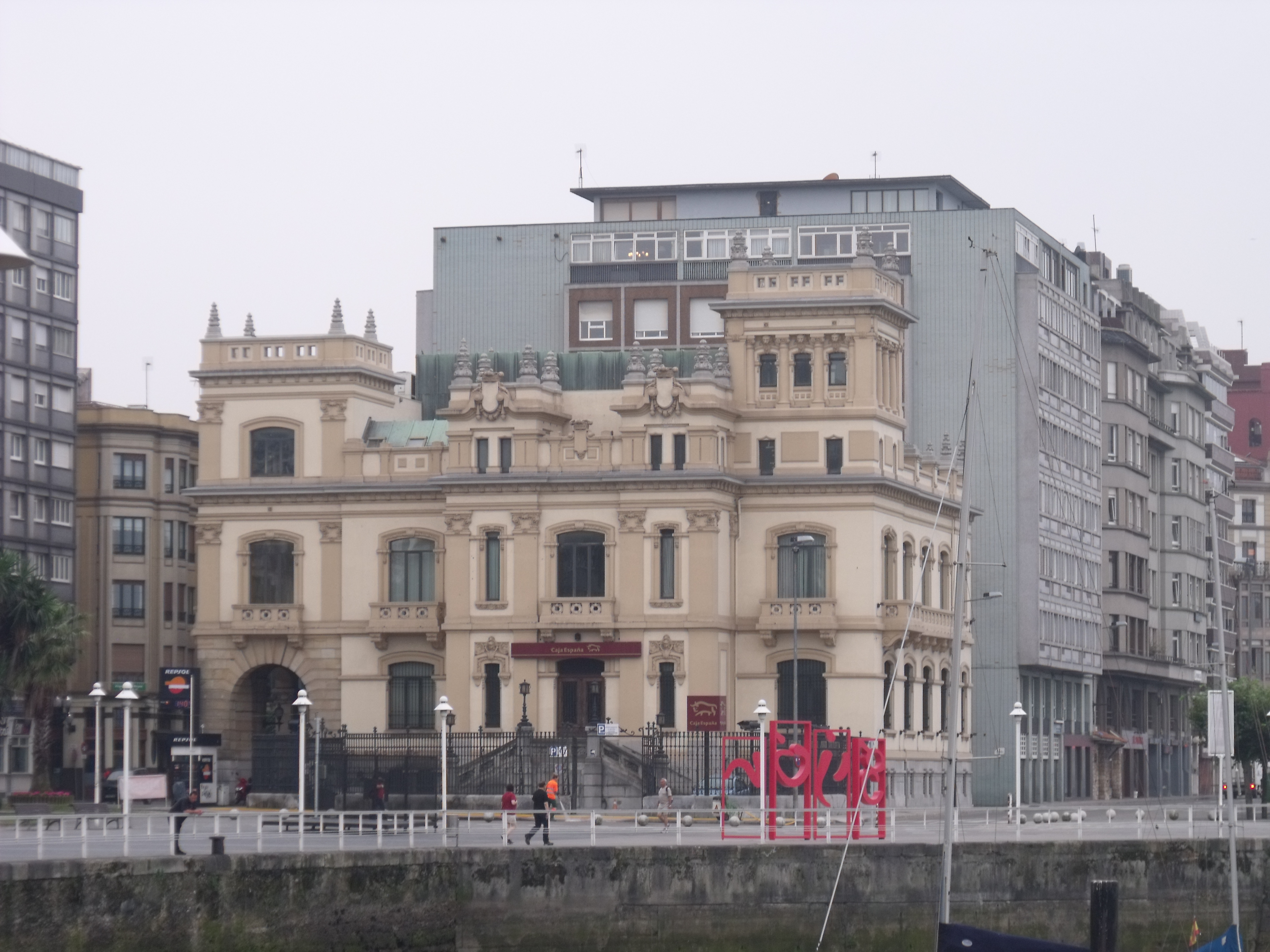 Edificios junto al puerto deportivo.